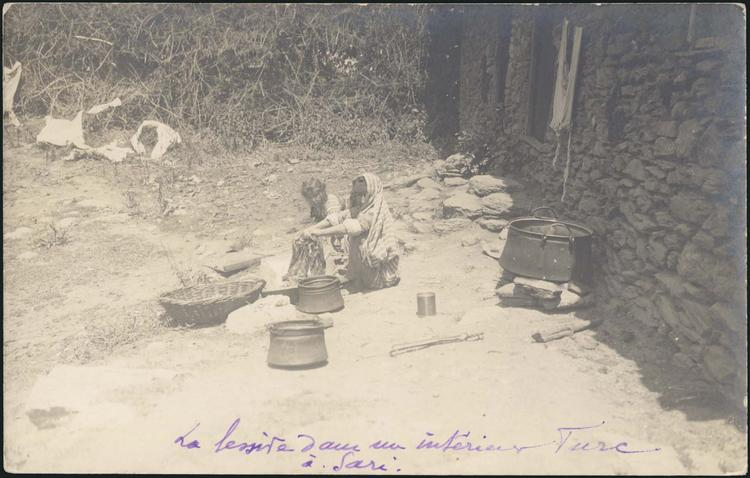 Селяни в Сари пазар.